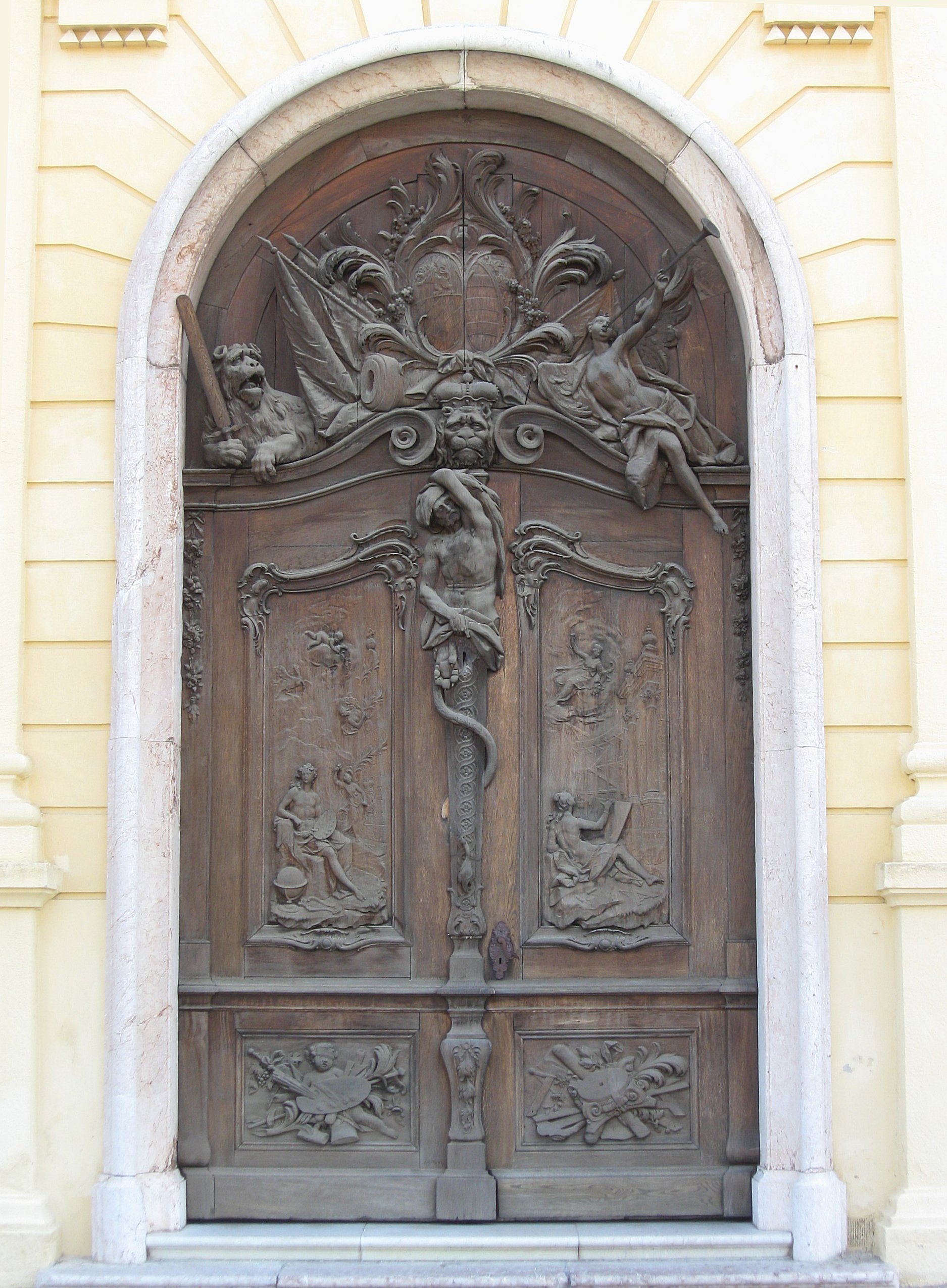 Neues Schloss Schleissheim, Westportal, von Ignaz Günther